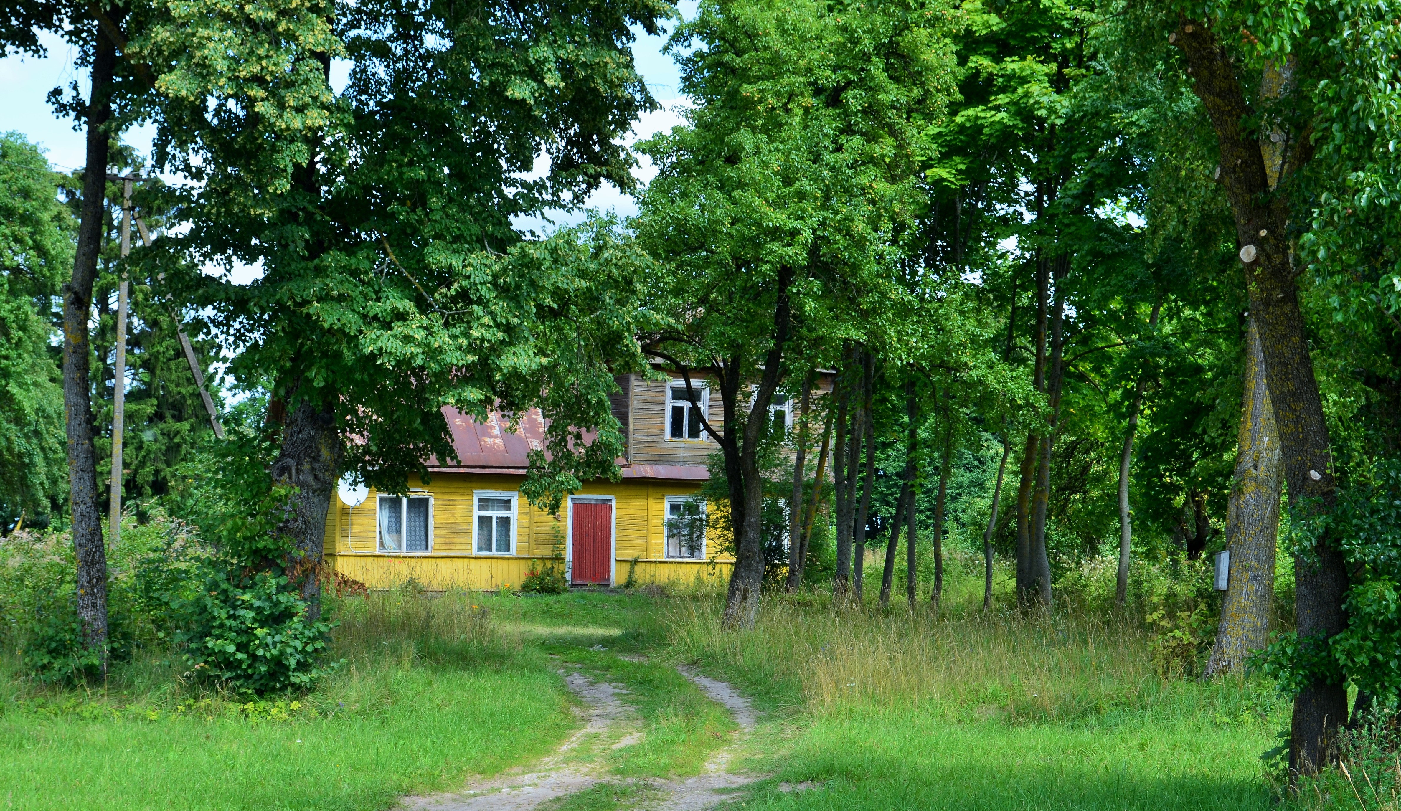 Buvusi mokykla, Lažai, Kėdainių raj.